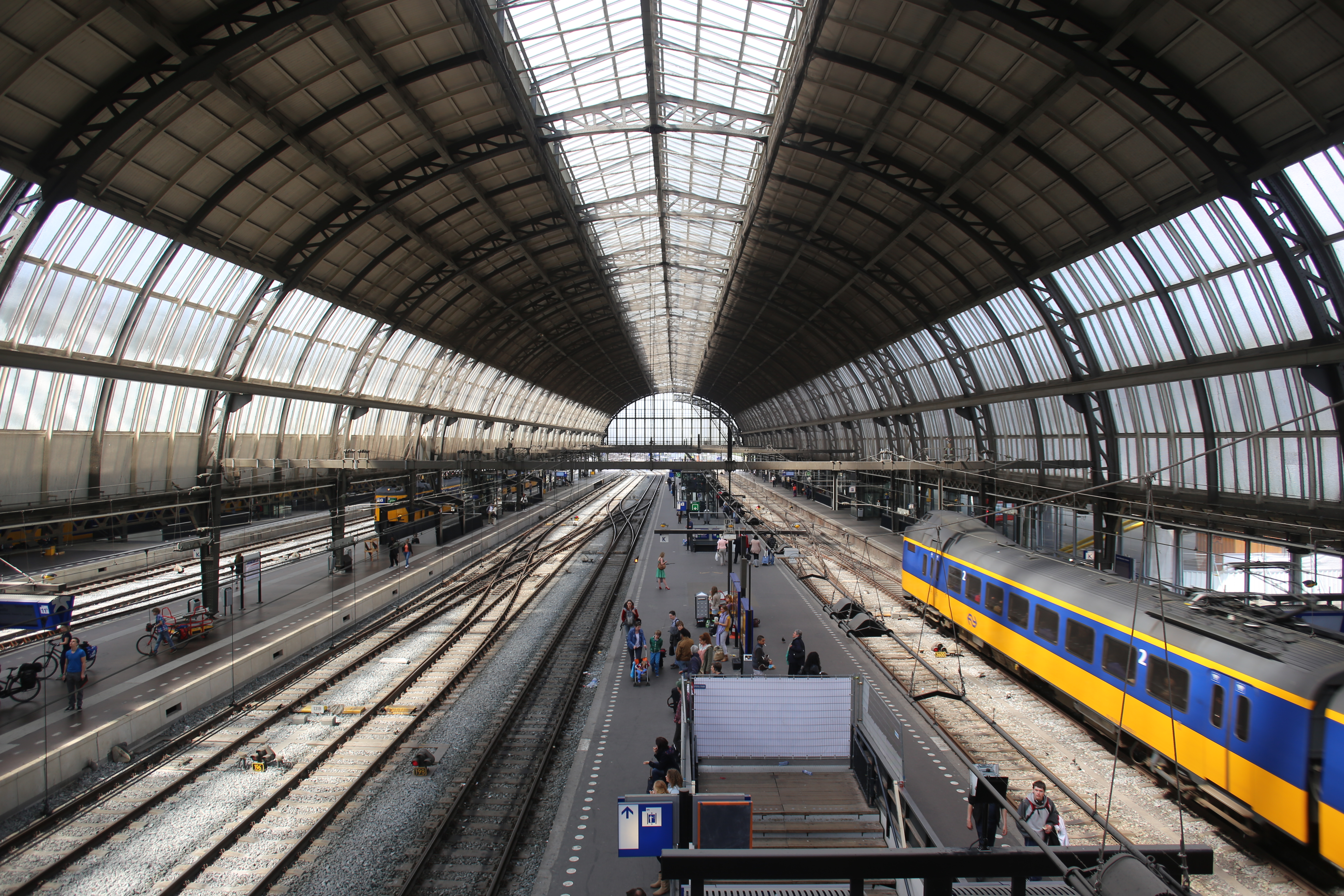 Foto realizada desde una torre central situada entre las vías y con la llegada de un tren para reflejar su carácter de transporte.